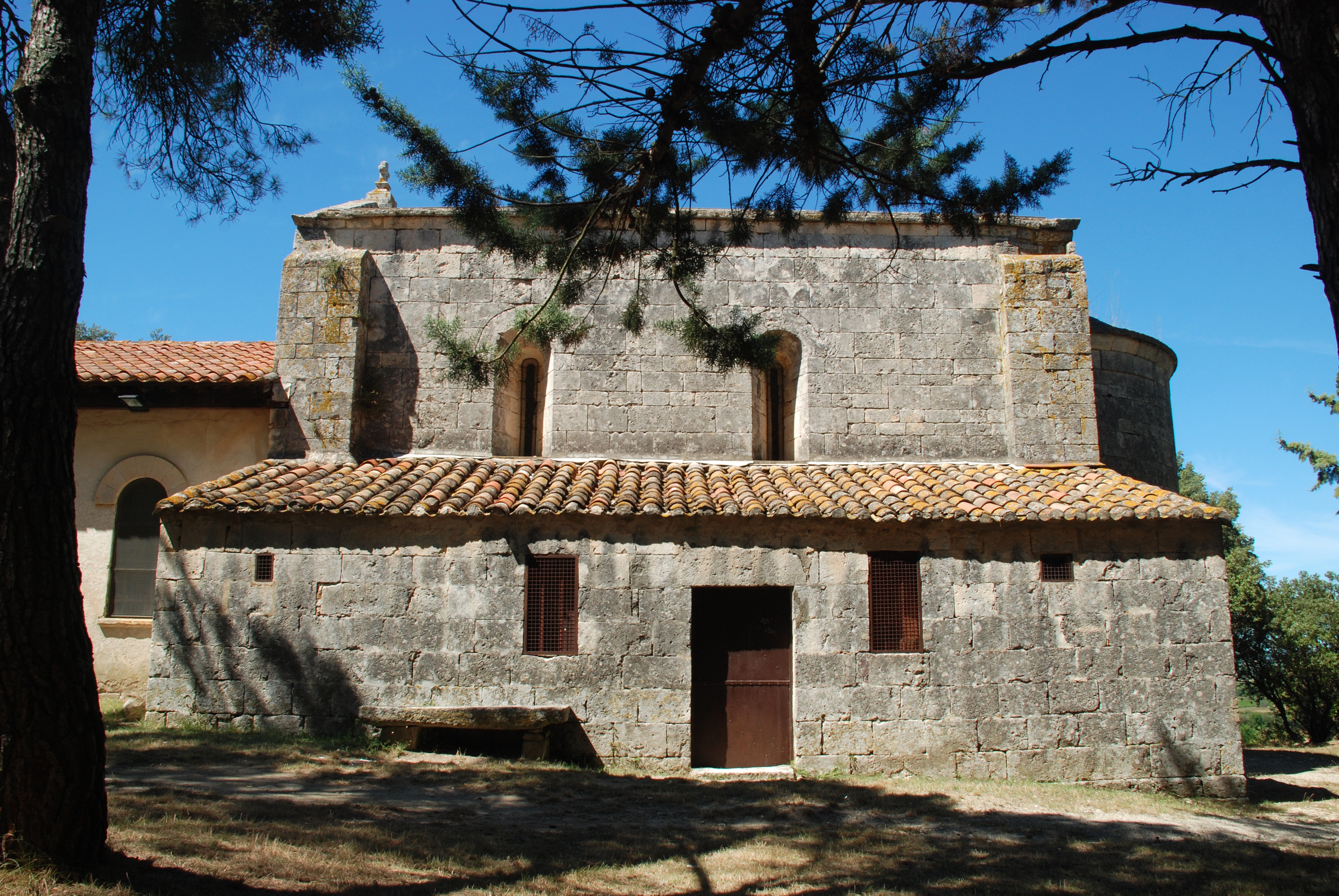 France - Hérault - Chapelle Notre-Dame-de-la-Pitié de Beaulieu